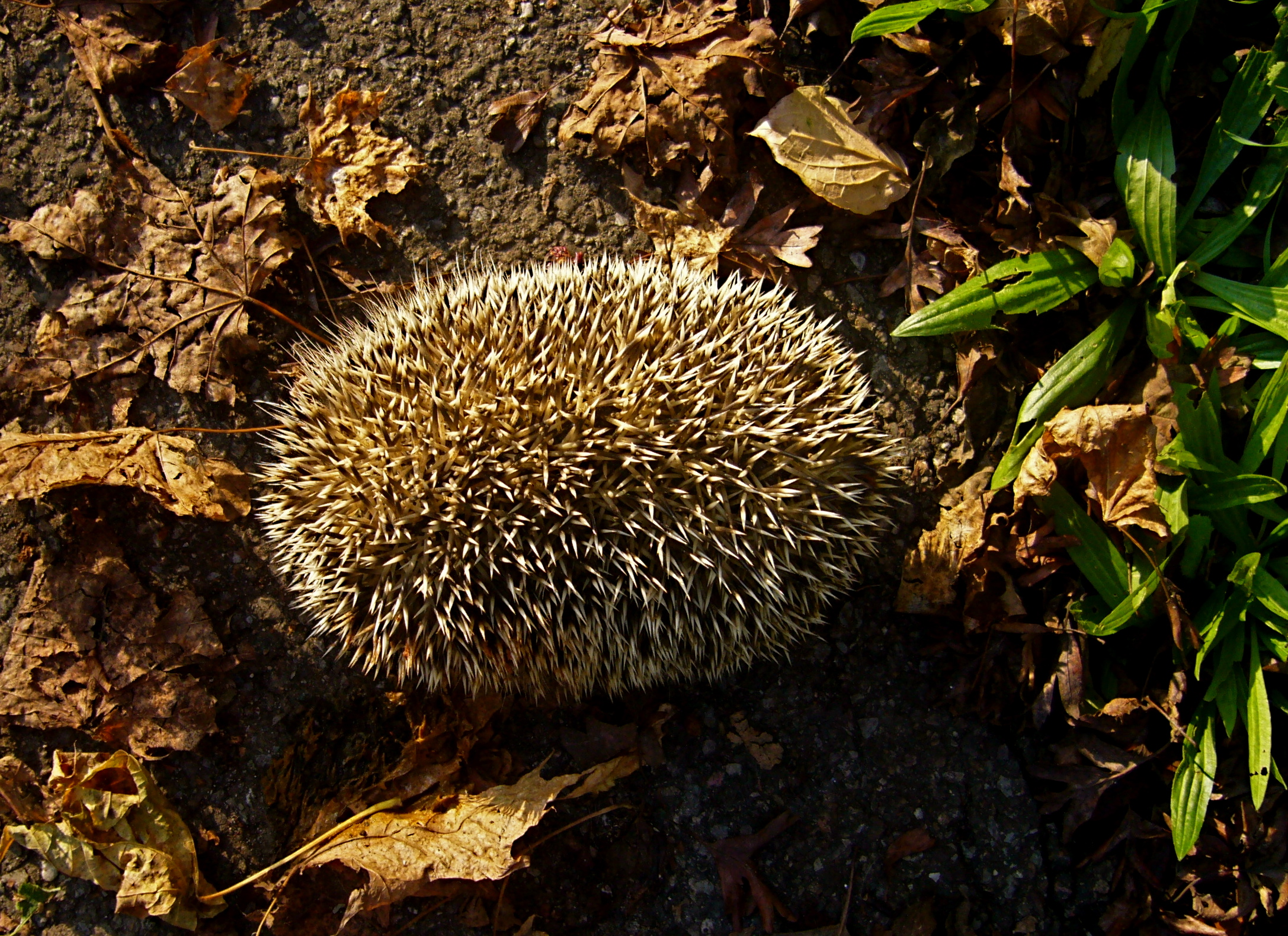 Eingerollter Braunbrustigel von oben gesehen.